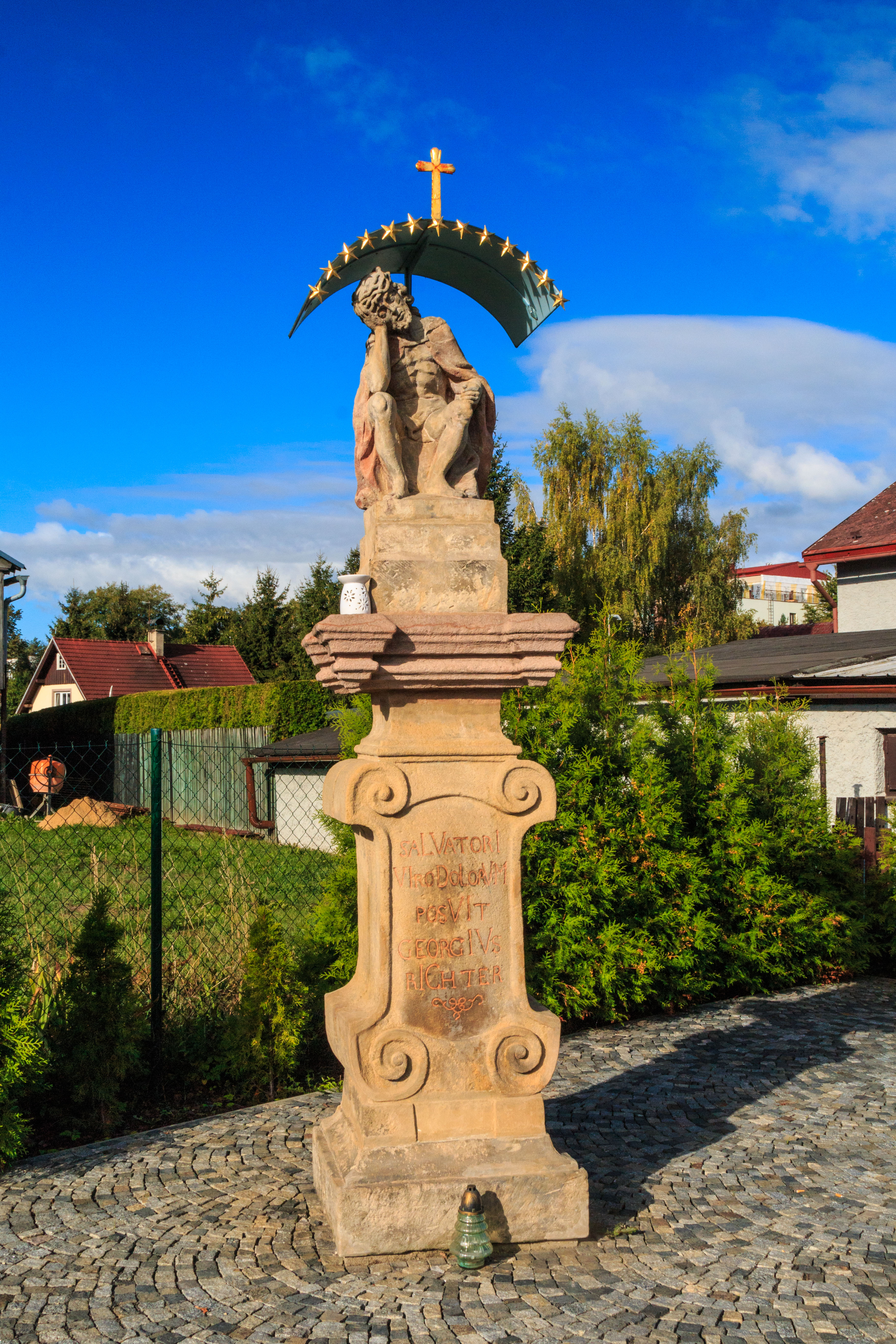 Socha Kristus po bičování, Potoční, jihovýchodně od čp. 99, pp. 1476, Markvartice (Jablonné v Podještědí).